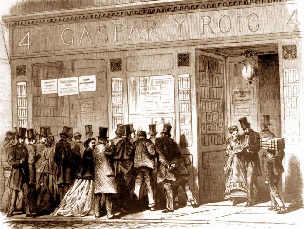 Escaparate de la empresa Gaspar y Roig cuando se expone «El Museo Universal». Las imágenes impresas tuvieron un atractivo para la sociedad del siglo XIX comparable al que hoy tienen nuestros medios de comunicación visual.